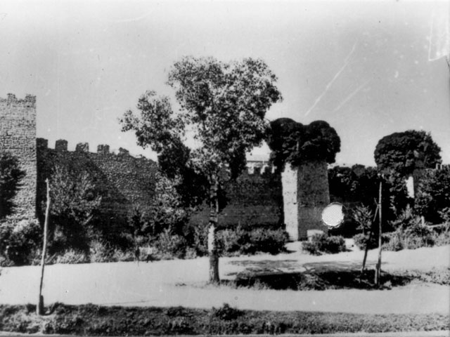 Murallas de Olmedo - Olmedo (Valladolid) - Cuaderno. Álbum de Valladolid - Fotografía 60 x 42 B/N